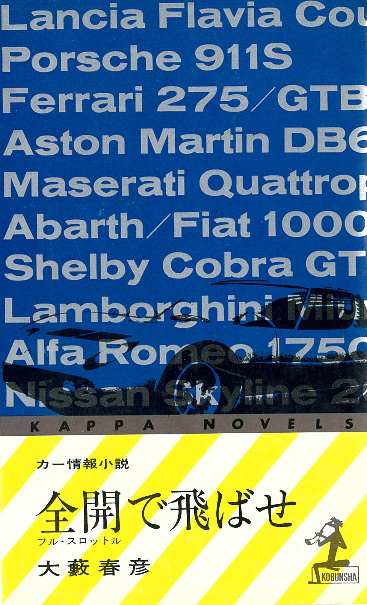 大藪春彦『全開で飛ばせ』1969年初版 カッパ・ノベルス